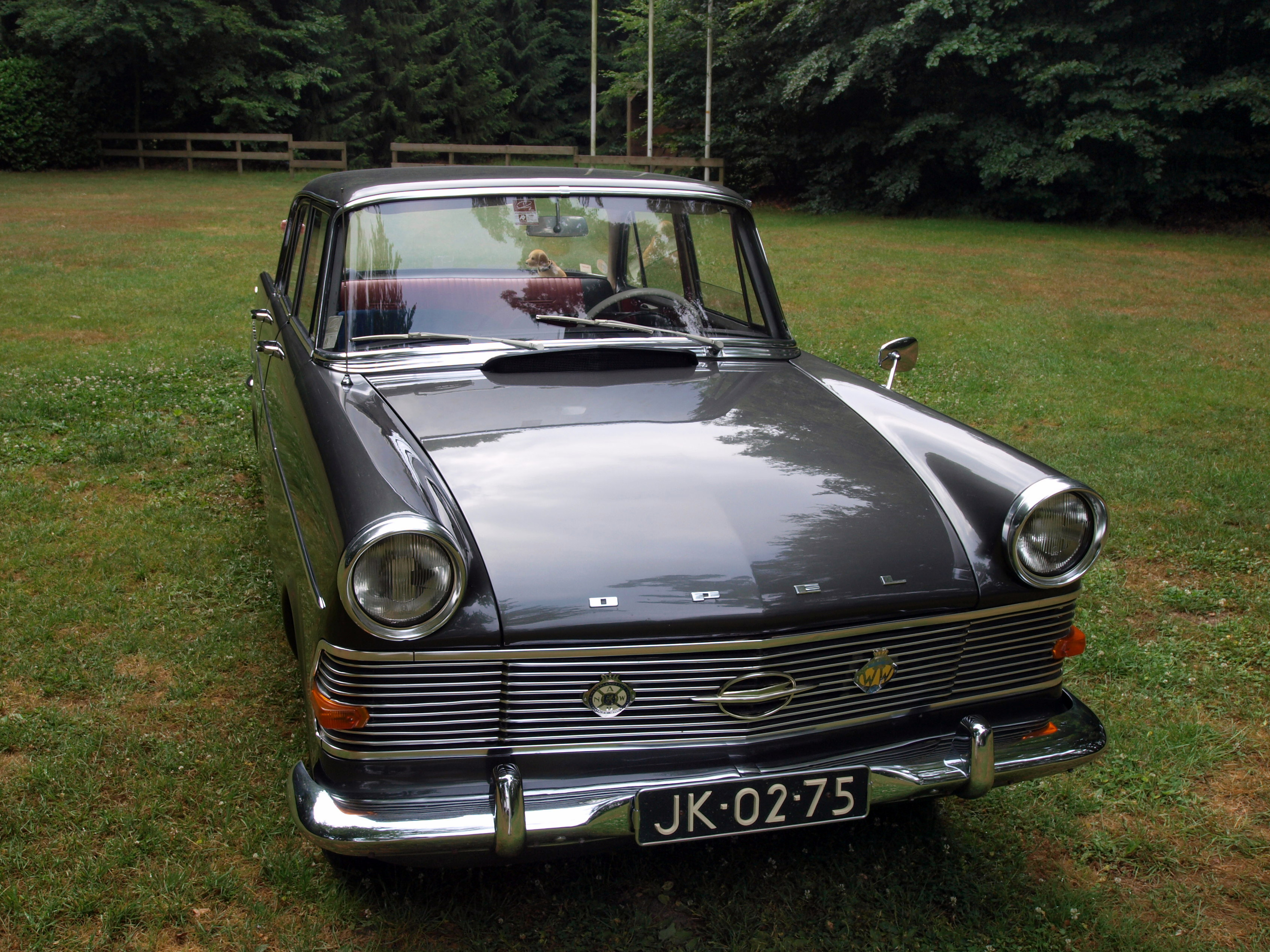 1962 Opel 17R4